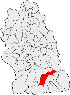 Categorie:Hărţi ale judeţului Hunedoara